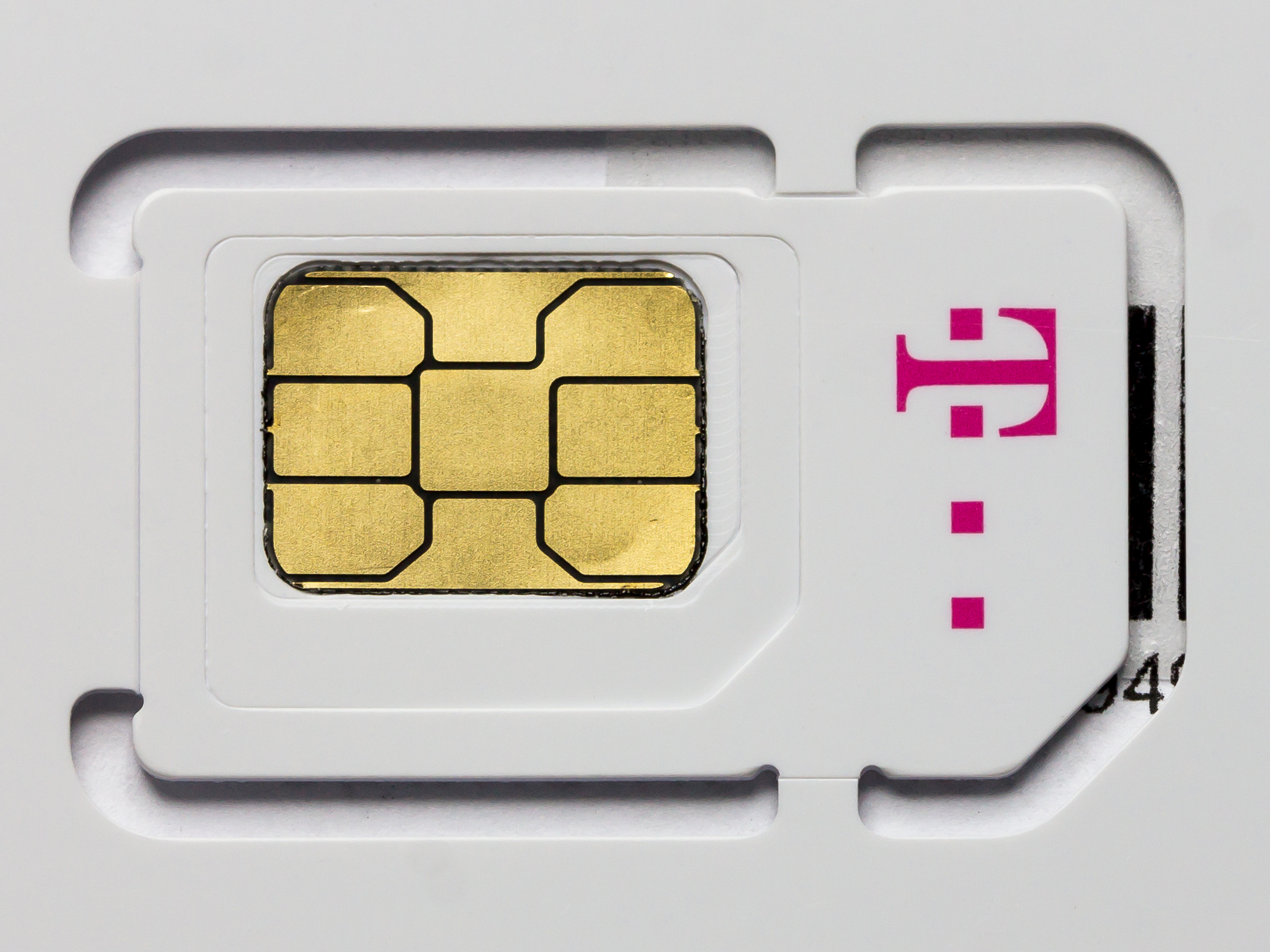 Kombi-SIM Deutsche Telekom: Eine Mini-SIM in der Verkaufseinheit. Vorgestanzt zum Herausbrechen sind Micro-SIM und Nano-SIM